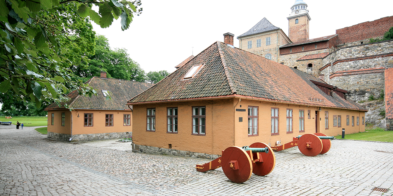 Barakker, indre bastionsfestning, Akershus. Bygd 1747-1778.